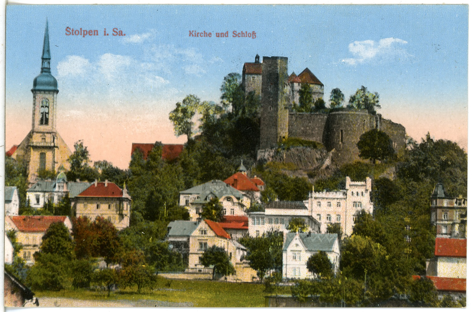 Stolpen; Kirche und Schloß This postcard is from publisher Brück & Sohn in Meißen ( postcard has a unique number 22131 and is available in a higher resolution at the publisher. This images was uploaded in a cooperation project between Wikipedians and the publisher.